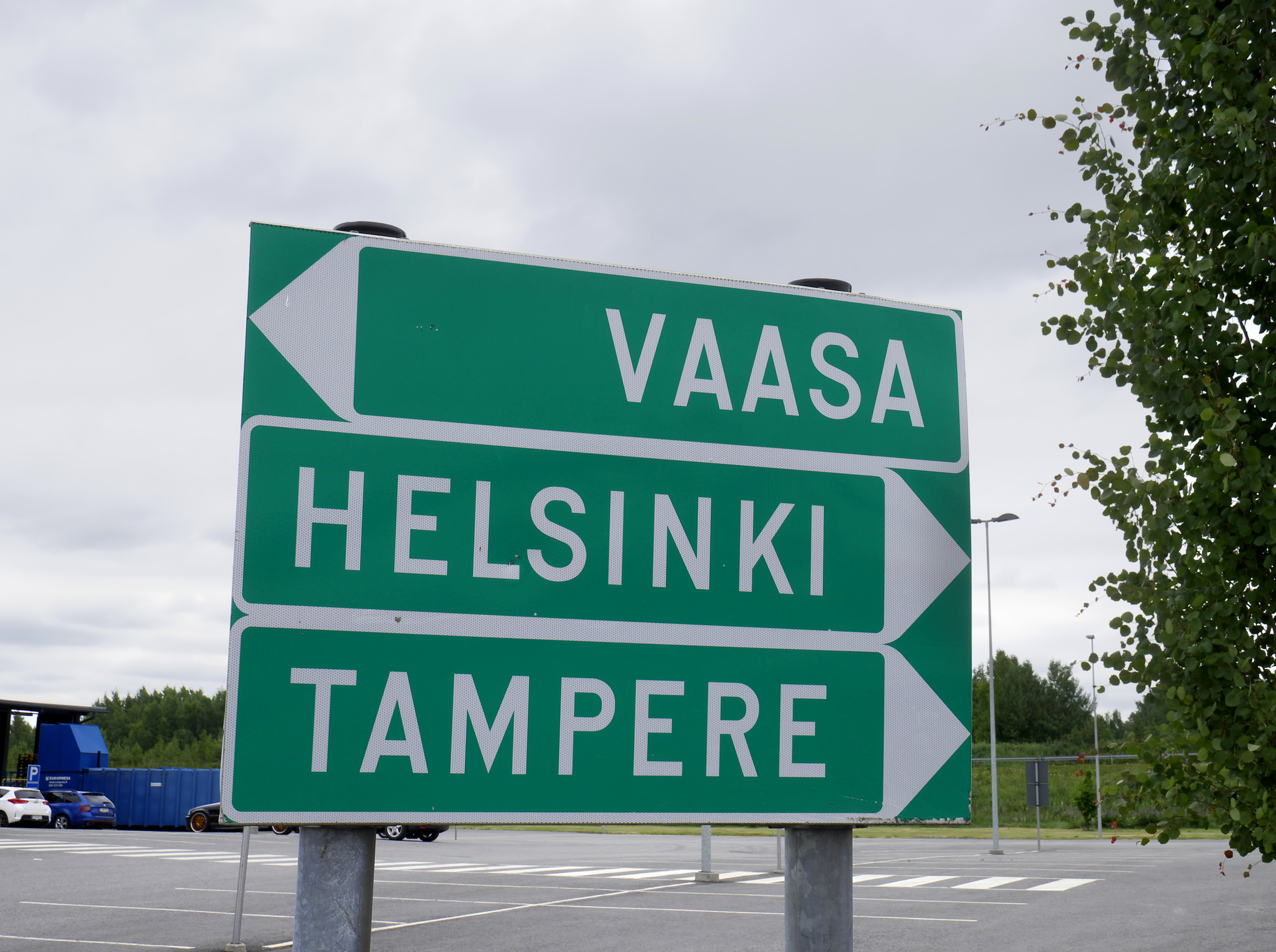 Vaasaan, Helsinkiin ja Tampereelle vievälle moottoritielle ohjaavia tienviittoja Pirkkalassa